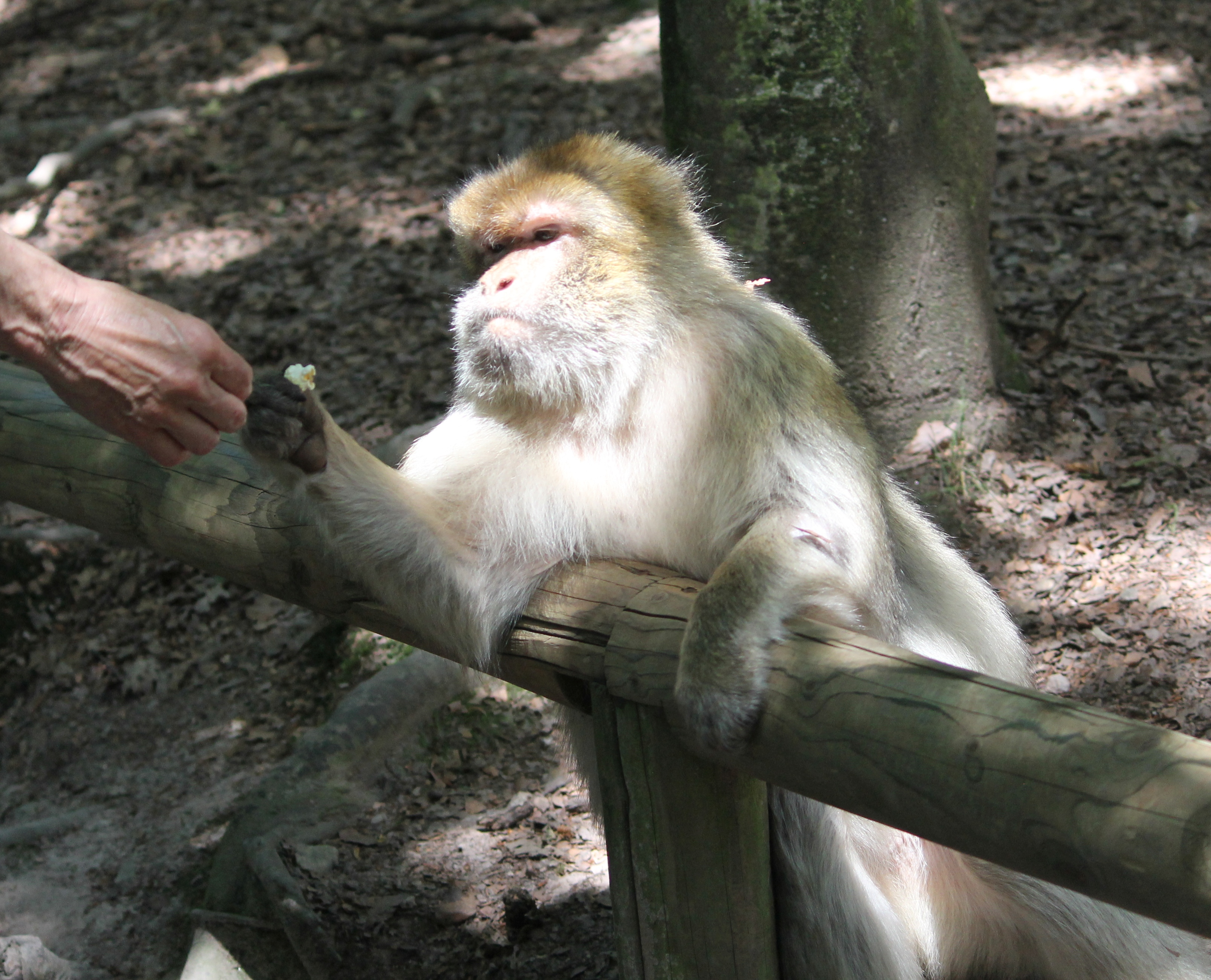 La Montagne des Singes, Kintzheim (2016)